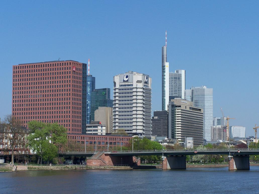 Skyline, Frankfurt am Main